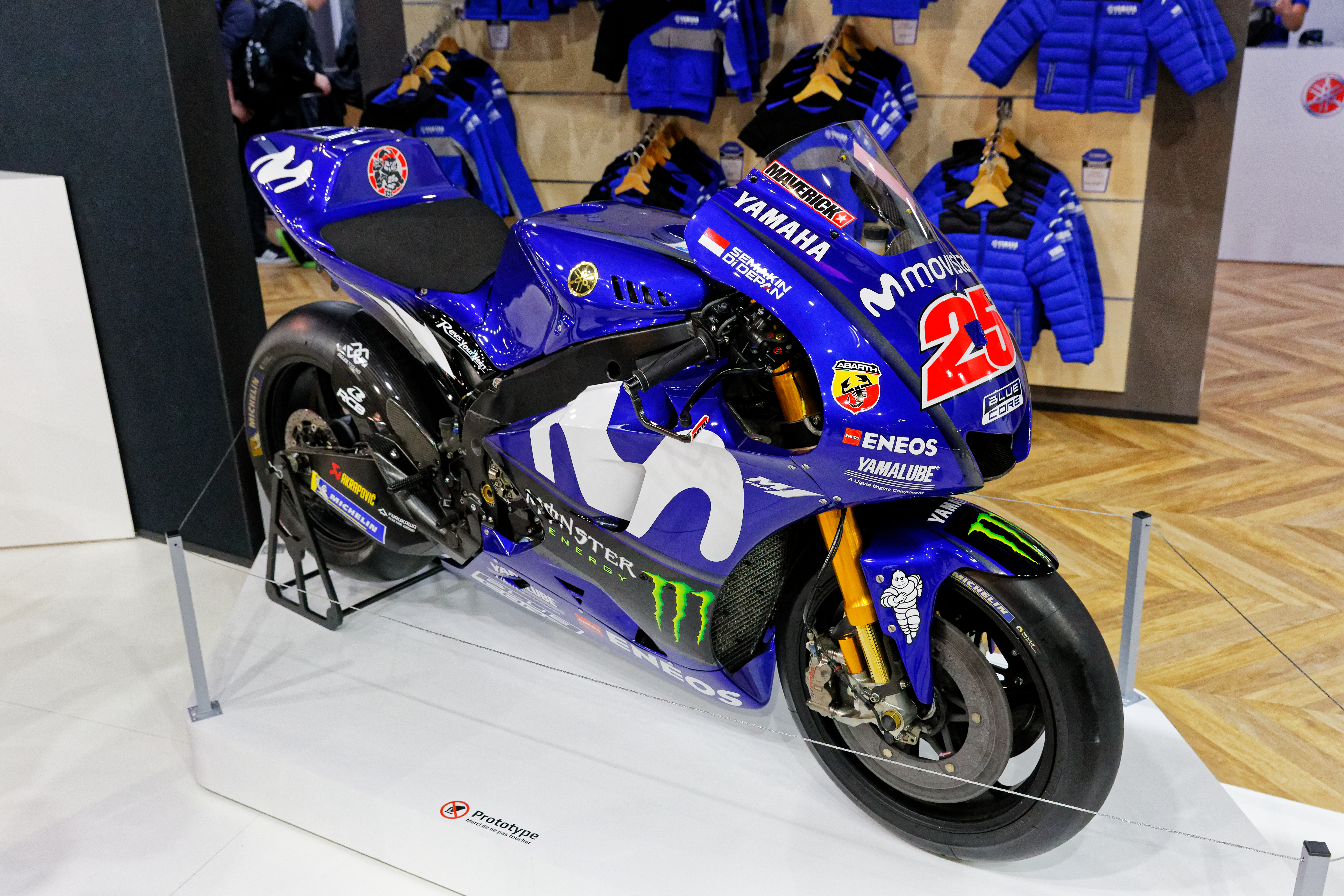 Un prototype Yamaha exposé lors du mondial de l'automobile de Paris 2018.